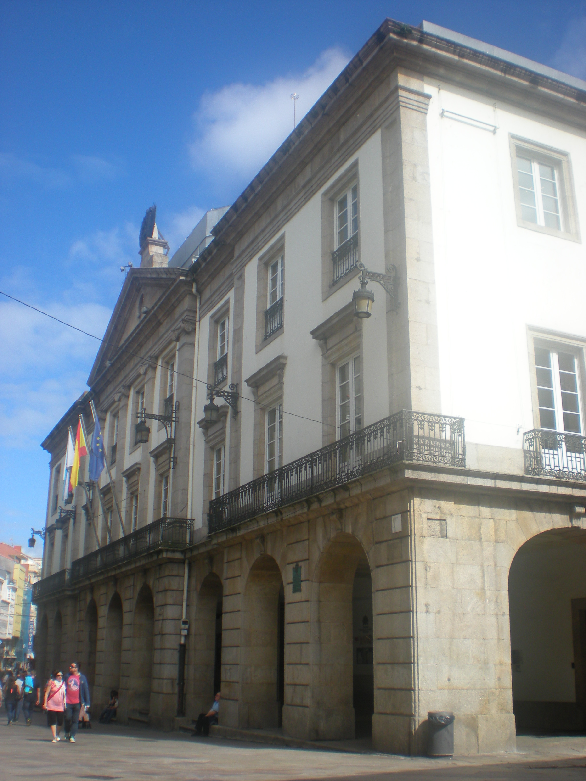 Fachada del edificio de la Biblioteca Provincial de la Diputación de A Coruña